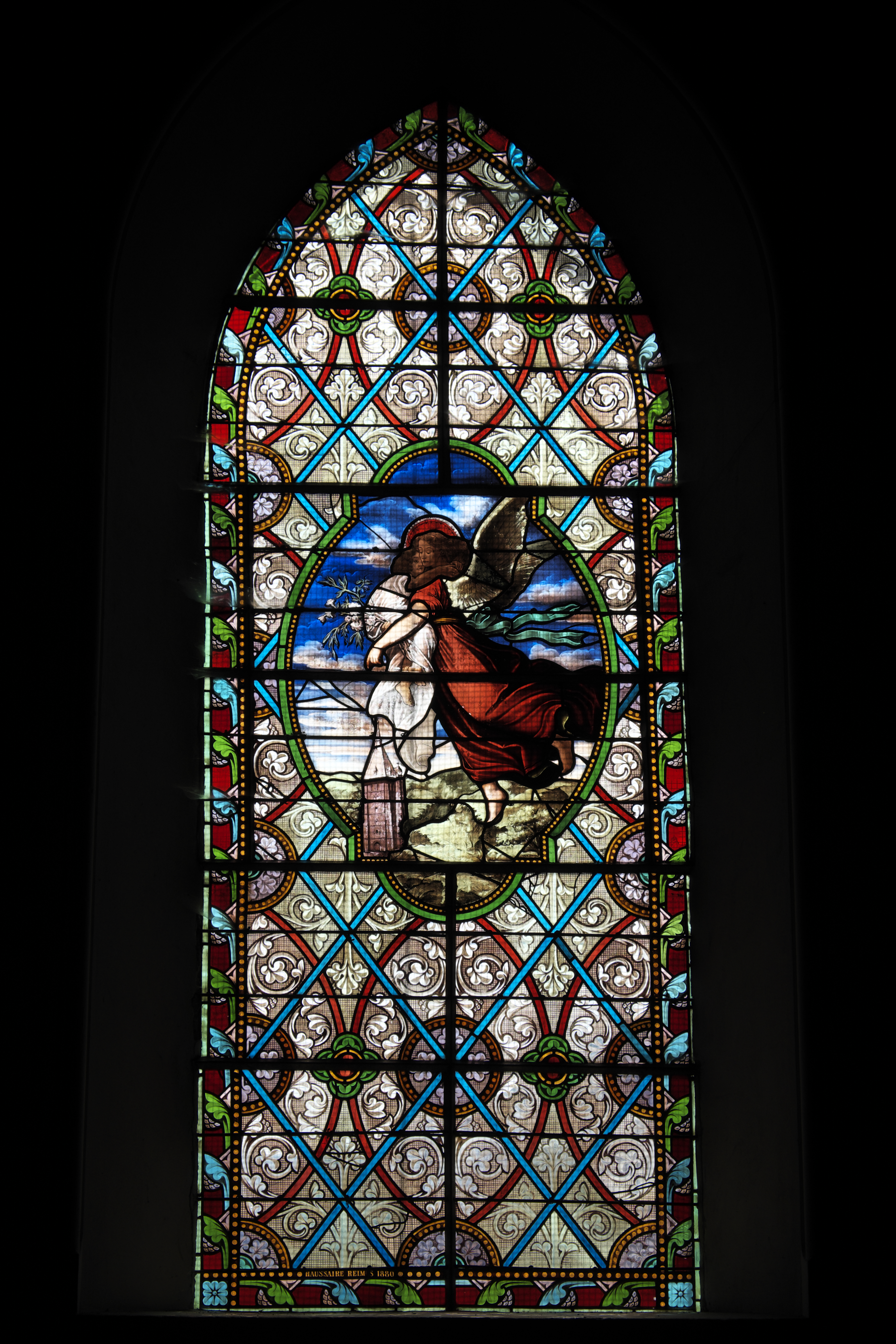 Katholische Kirche Notre-Dame in Senonches im Département Eure-et-Loir (Centre-Val de Loire/Frankreich), Bleiglasfenster mit der Signatur: HAUSSAIRE REIMS 1880; Darstellung: Engel über der Kirche von Senonches